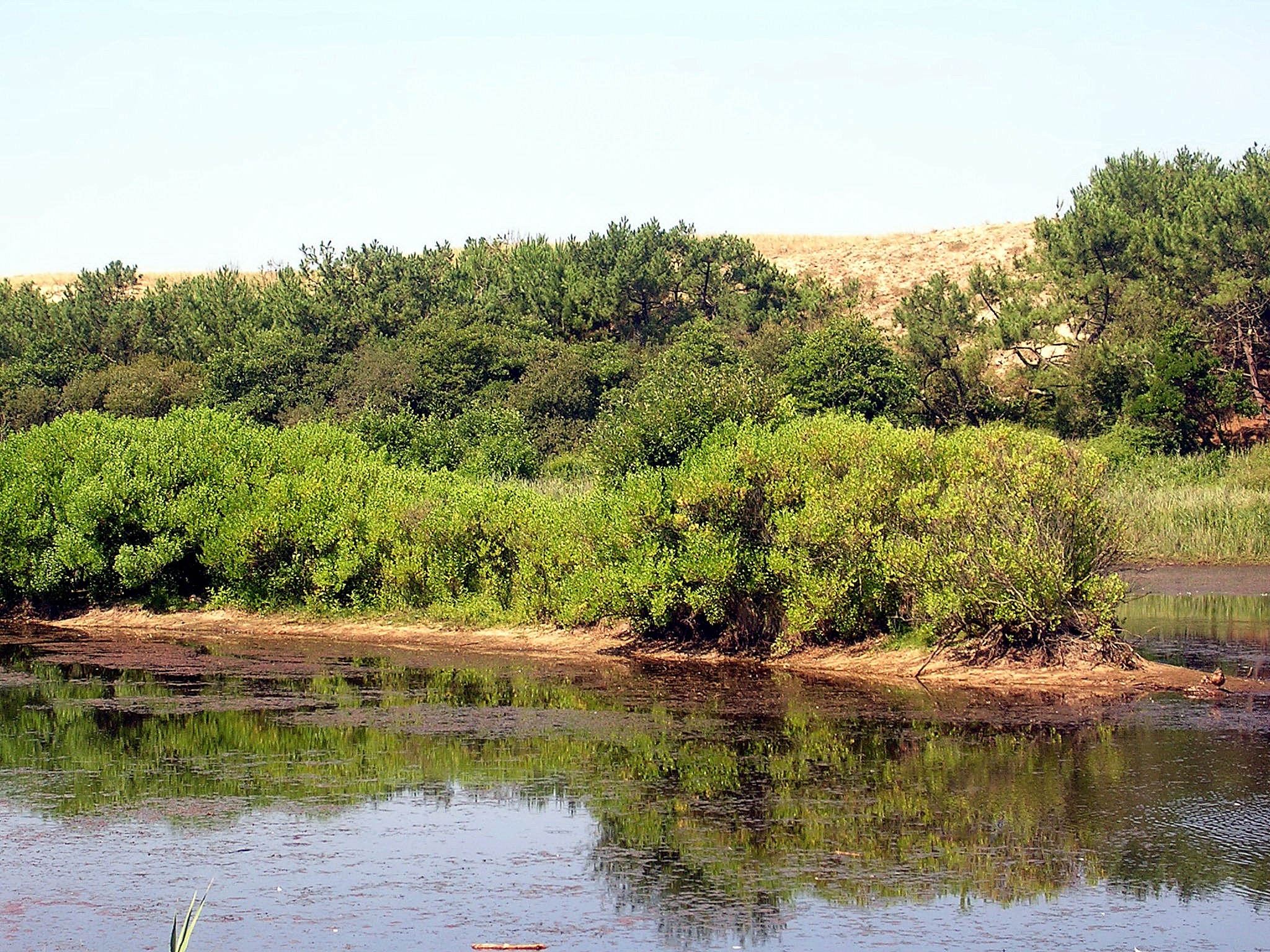 Petit étang de la Mallouèyre dans la lette de la Côte à Mimizan (Landes, France), juste à l'arrière du cordon dunaire.